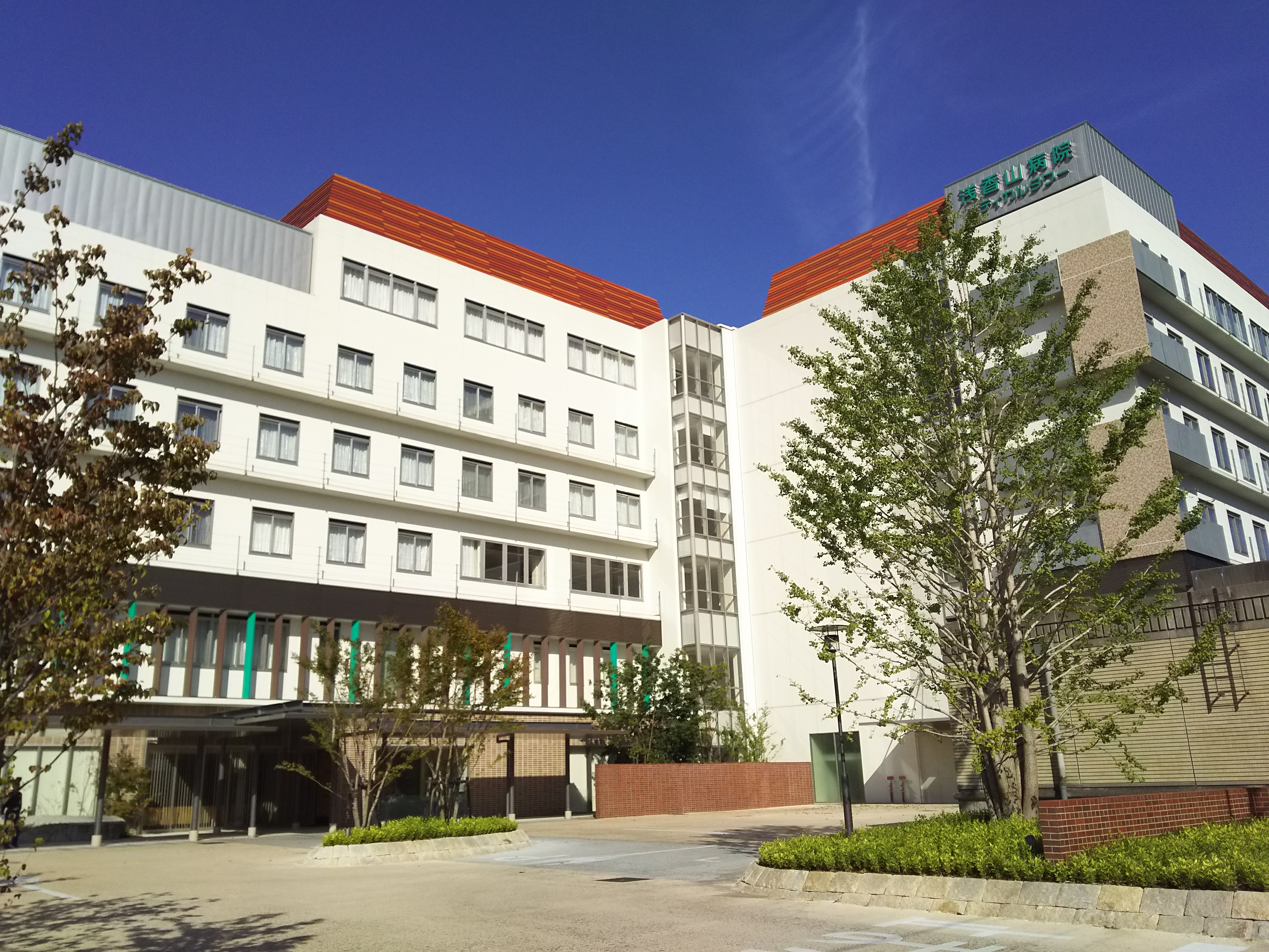 浅香山病院メディカルタワー（大阪府堺市）